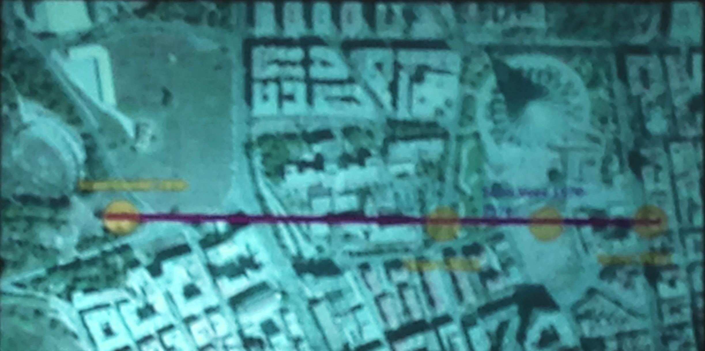 Strada che arrivava presso l'arco Augusteo